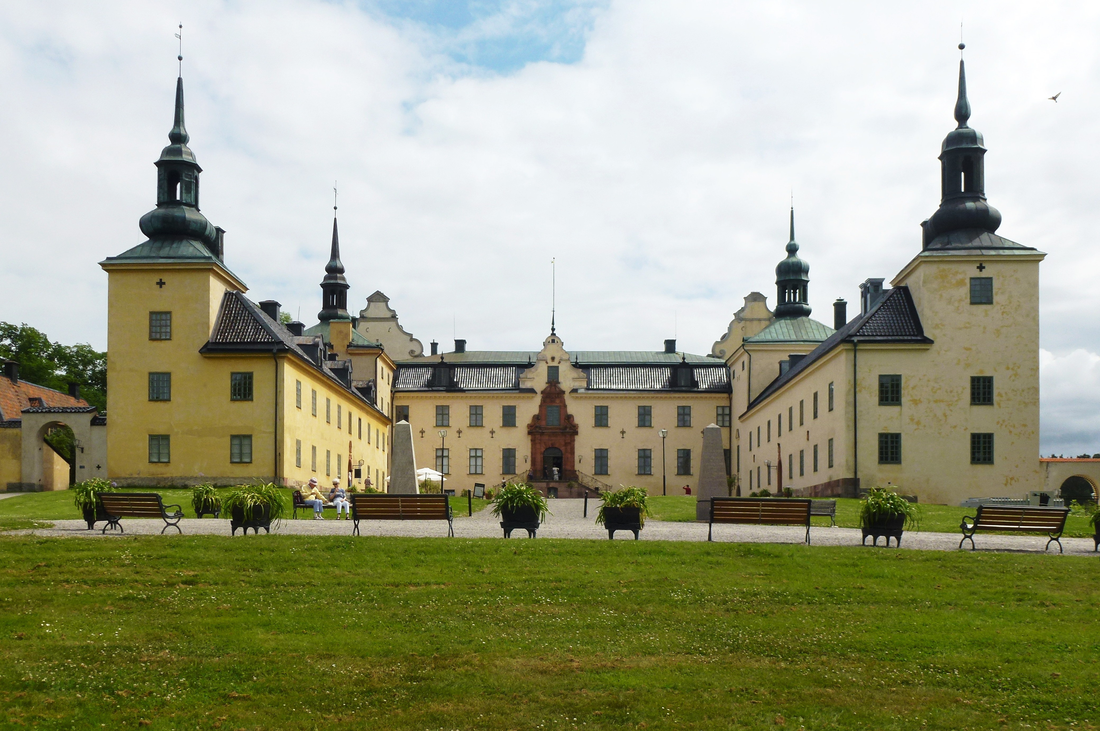 Tyresö slott huvudfasad